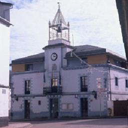 Ayuntamiento del cocejo asturiano de Grandas de Salime